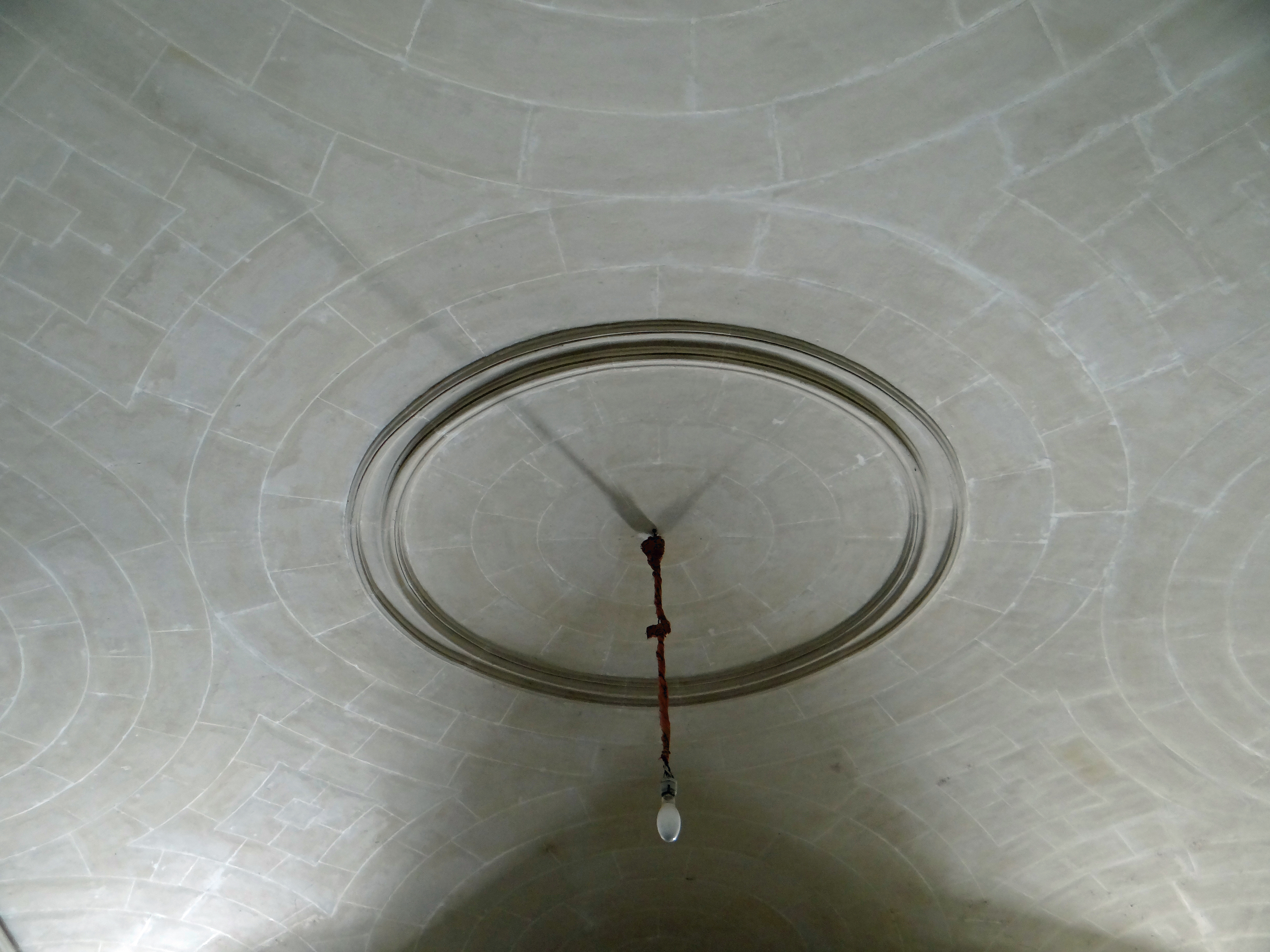 Viviers - Palais épiscopal, actuelle mairie - Plafond en voûte plate du vestibule